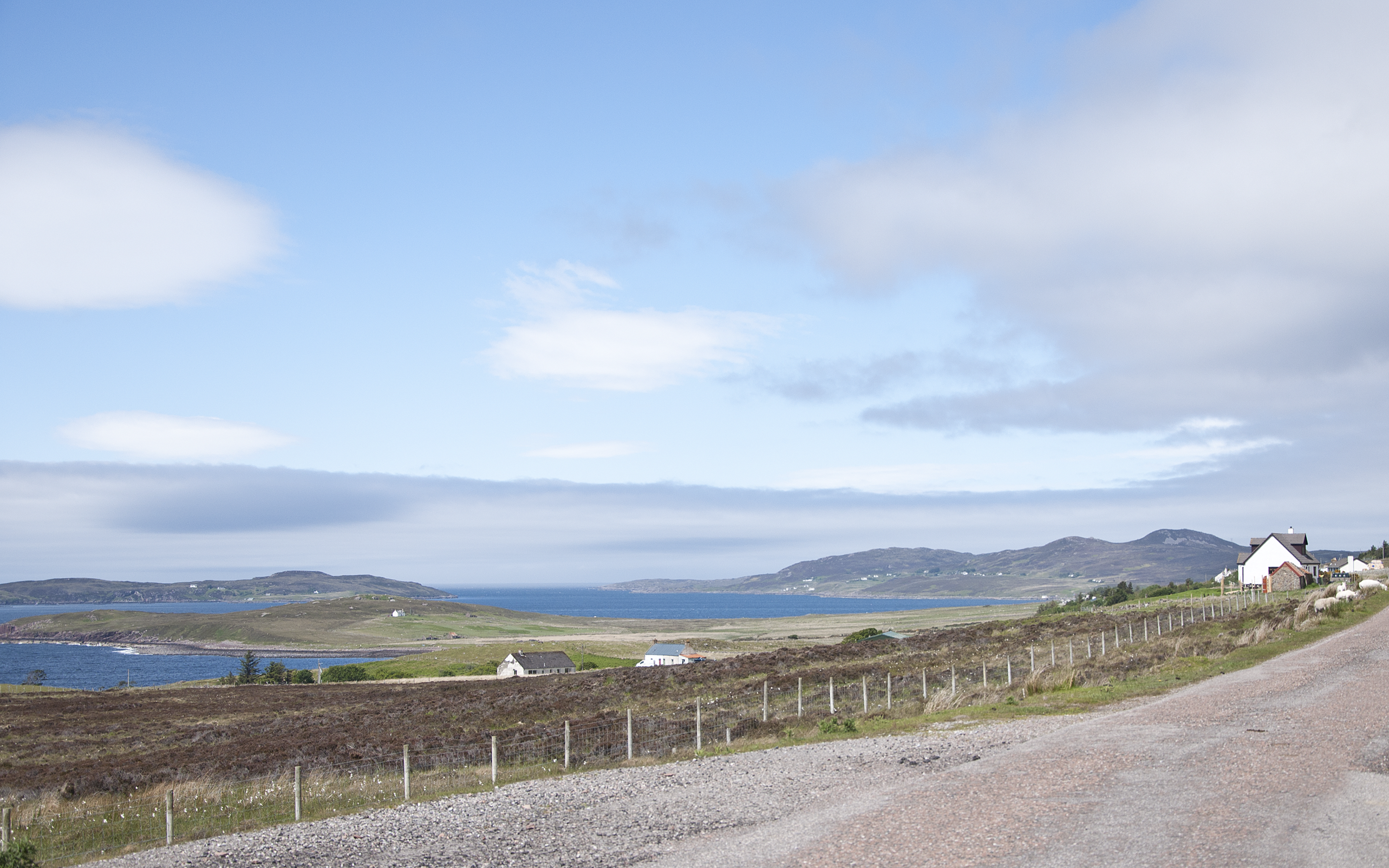 Achiltibuie, Ross en Cromarty, Schotland